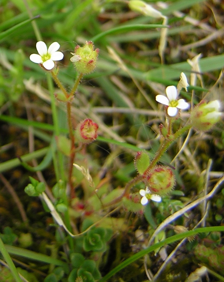 Saxifraga tridactylites Source : [1]